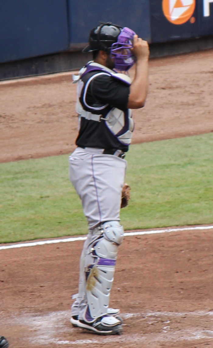 Wilin Rosario